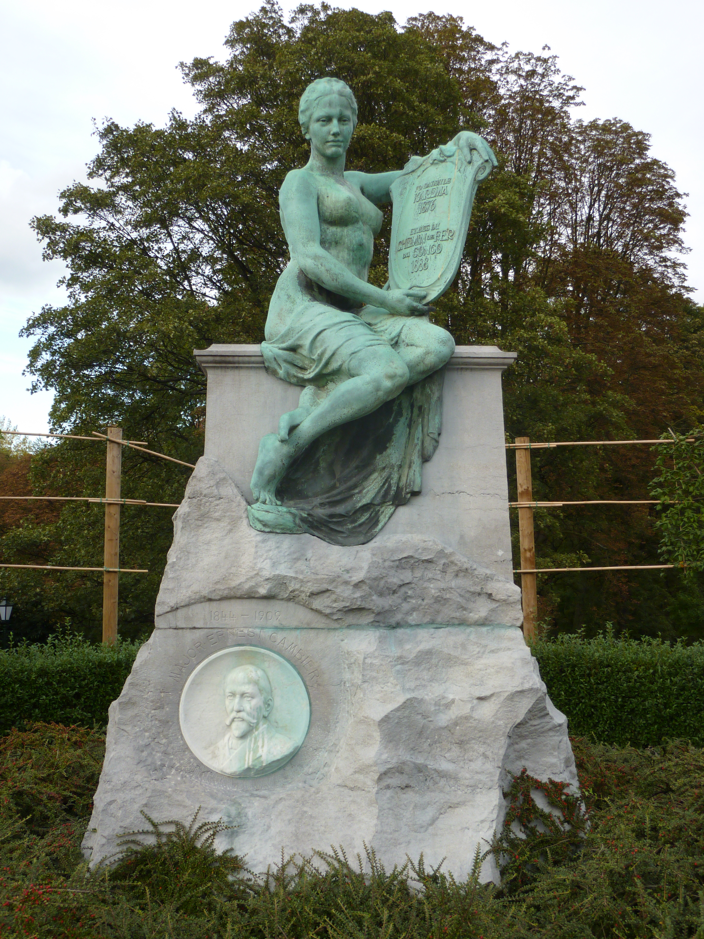 Mémorial Ernest Cambier au parc Josaphat, Schaerbeek, Bruxelles, Belgique.